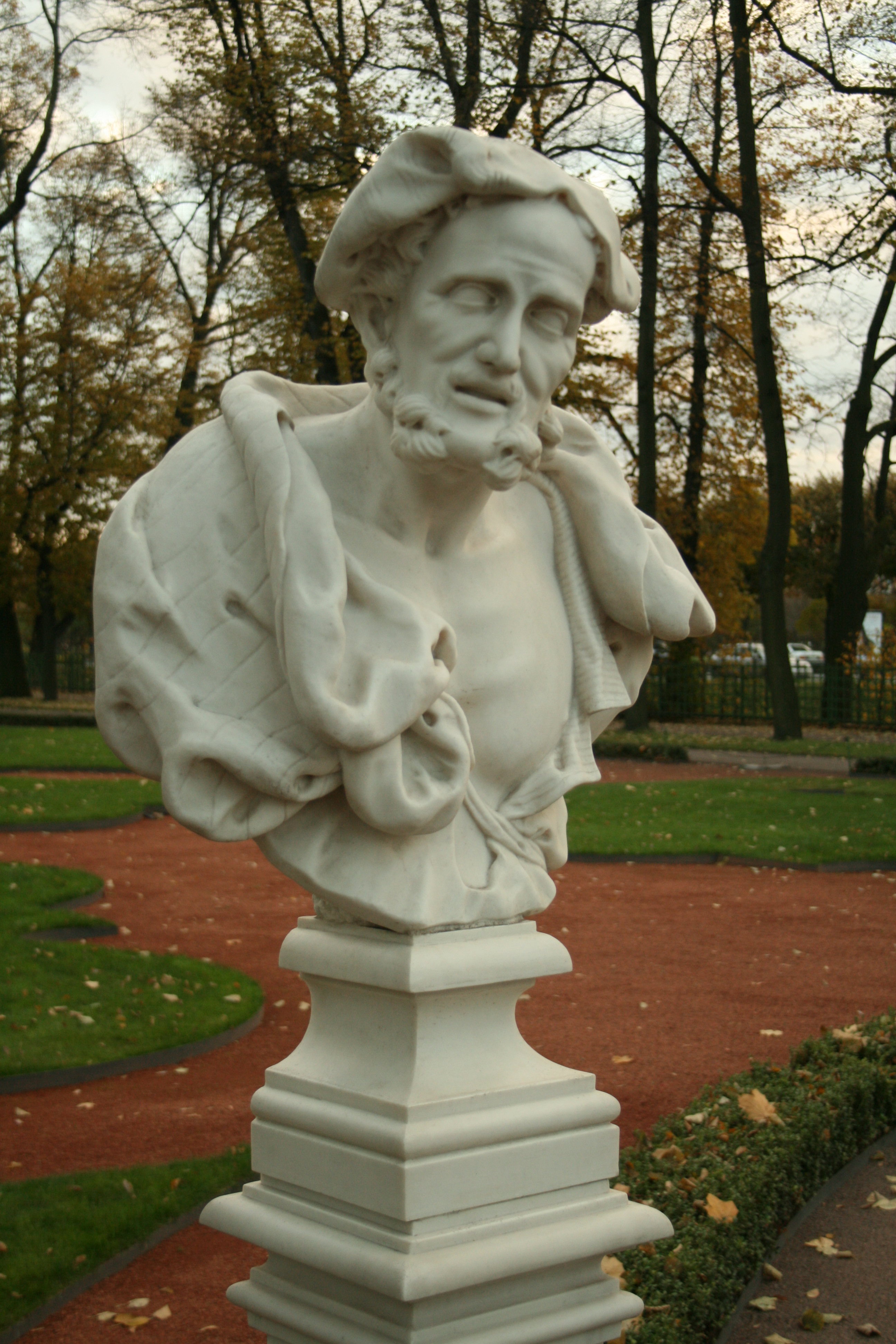 Бюст Аристотеля (Санкт-Петербург и Лен.область, Санкт-Петербург, партер, северная часть)